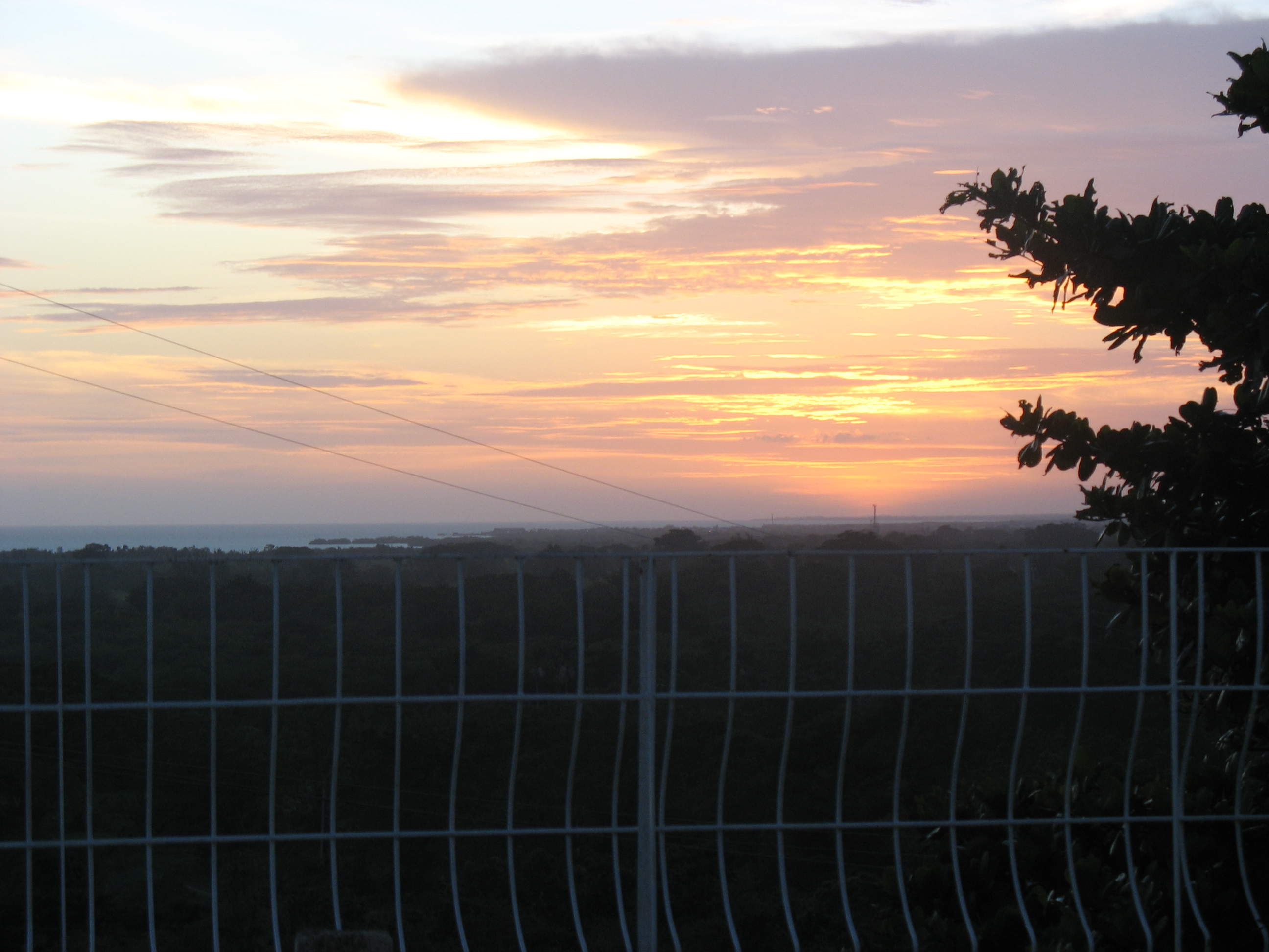 Sunset Savanna la Mar